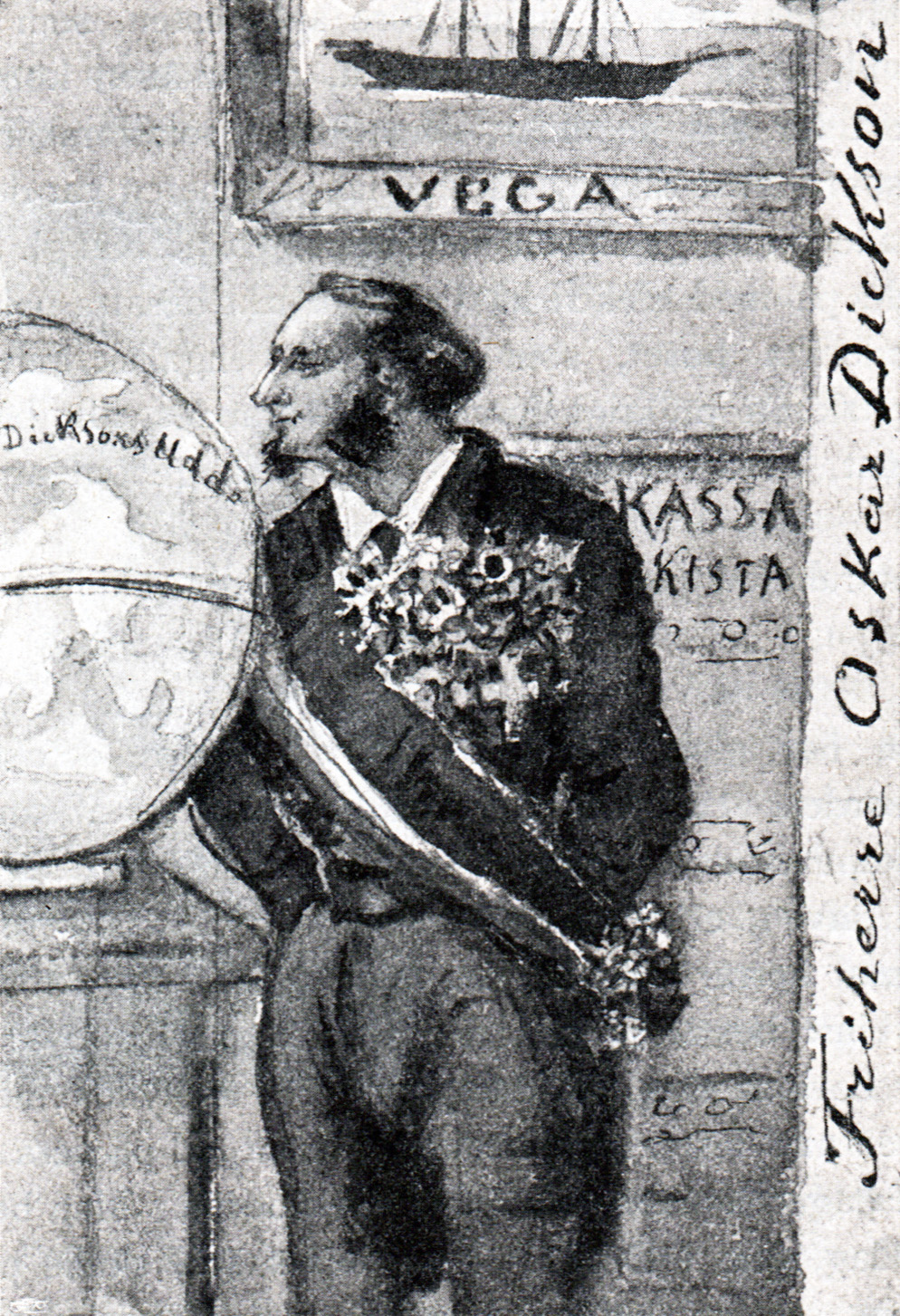 Oscar Dickson (1823-1897)